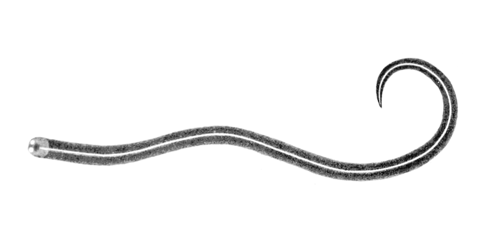 † Geonemertes rodericana (Gulliver, 1879) = Tetrastemma rodericanum Gulliver, 1879 (Nemertea: Enopla: Monostilifera) [1]